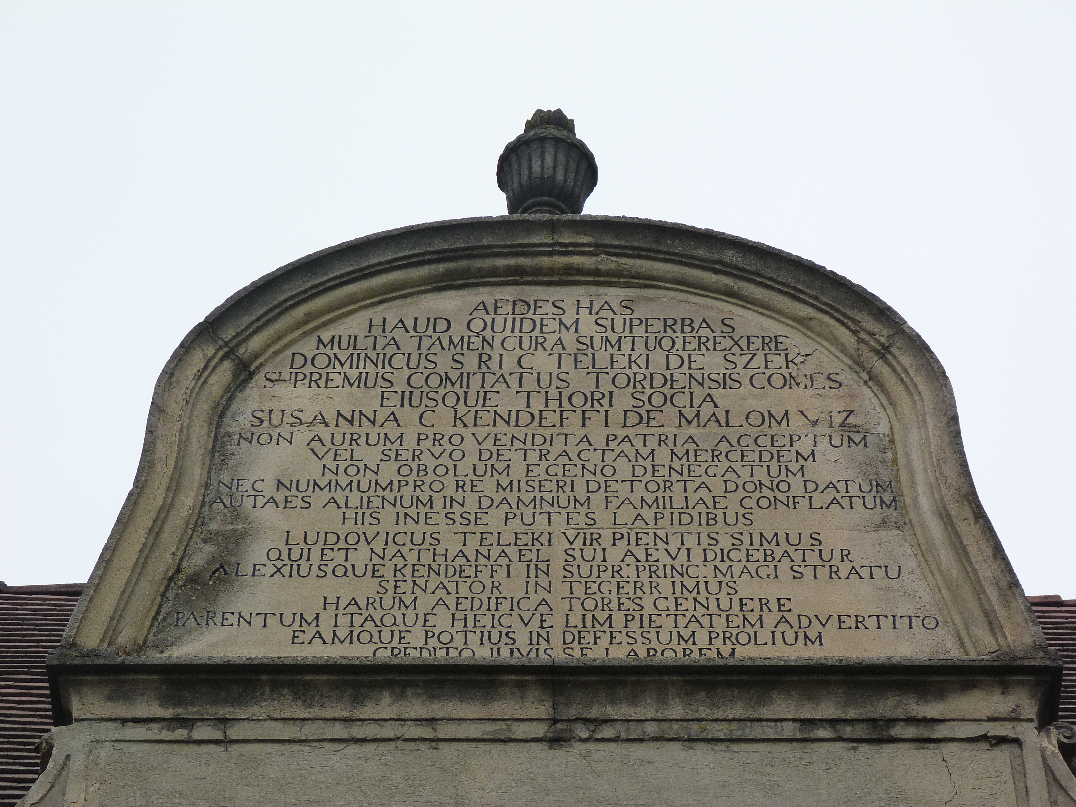 A felvétel 2013. július 12 -én pénteken készült Marosvásárhelyen. ©© Published under Creative Commons in the Metapolisz DVD line. All of the photos and vids in the Metapolisz DVD line are under Creative Commons and can be used even for commercial – for profit – purposes. Recommended Citation Derzsi Elekes Andor: Metapolisz DVD line